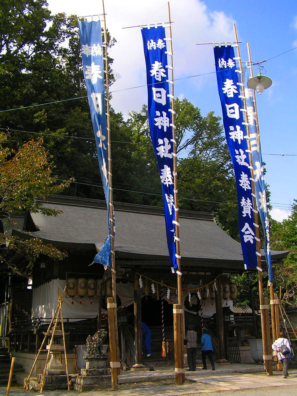 篠山春日神社sasayama-kasugajinja 春日神社（かすがじんじゃ）は、篠山市黒岡75にある神社。奈良の春日大社から分霊された。 目次 [非表示] 1 概要 2 歴史 3 社殿 4 文化財 5 年間行事 6 交通アクセス 7 関連項目 8 外部リンク [編集] 概要 奈良の春日大社の分祠を祭り、地元では「おかすがさん」と呼ばれる氏神。能楽殿で演じられる春の春日能と秋の祭礼（10月第3土・日）の京都八坂の祇園祭を模したといわれる4基の神輿、華麗な飾り付けを施された9基の山鉾巡行は京文化を強くうかがわせ、笛や鐘の囃子を響かせながら小京都雰囲気の残るの古い町並みを練り歩く様子は、近代的な町で行われる本場の京都の祇園祭よりも情緒あるものとして知られる。 [編集] 歴史 平安時代初期の876年（貞観18年）当時、日置荘を領有者であった藤原基経、藤原時平父子により藤原氏の氏神である春日大社（奈良県）より分詞し黒岡村南部の当時は笹山と呼ばれた現在は篠山城のある小山に勧請し、祀り氏神としたのが起源とされる。後の1609年（慶長14年）、篠山城築城の際に現在の地に遷された。 秋の祭礼に使われる4柱の神霊を移した金神興は、2基を黒岡村より元禄7年6月に、他の2基は安永8年9月（元禄13年の説もある）篠山町より寄進されたもの。9台のちんちき山と呼ばれる山鉾は寛文3年以降に各町内より寄進されたもので、京都の祇園の山鉾を模し造られており、絢爛豪華である。明治後期までは鳳凰・孔雀・蘇鉄・猩猩等の鉾をつけ巡行したが、電線が障害となり現在は鉾を付けずに巡行される。また太鼓御興は、交化交政に、王地山焼の陶工たちが担ぎ始めたのが始まりと伝えられる。 鉾山 長さ6m、高さ約5m、屋根までの高さは京都祇園祭・山鉾の約三分の二ほどの規模ながら京都の祇園祭に強い影響を受けている。初期の鉾山は現在よりも小形で簡素なものだったが、江戸時代中期頃に現在の規模となり華麗さを増した。初めて鉾山が作られたのは1663年（寛文3年）の三笠山 （上河原町）と伝えられる。篠山市指定文化財。 上町4台 三笠山（上河原町）、鳳凰山（下河原町）、孔雀山（上立町）、高砂山（下立町） 下町5台 剣鉾山（呉服町）、猩々山（上二階町）、諫鼓山（下二階町）、蘇鉄山（魚屋町）、鏡山（西町） 神輿 1694年（元禄７年）および1779年（安永8年）に寄進奉納されたが、4基あるのは春日神社の4祭神にちなんだもので、4祭神とは天児屋根命（あまのこやねのみこと）、武甕槌命（たけみかつちのみこと）と経津主命（ふつぬしのみこと）比売神（ひめのおおかみ）である。 [編集] 社殿 本殿 能楽殿 篠山藩主13代藩主青山忠良によって江戸時代末期である1861年（文久元年）に建てられた能舞台。建築は稲山嘉七、永井理兵衛、舞台背景に描かれた松の絵は松岡曾右衛門によるもので、当時箱根以西において最も立派なものであると称えられた。正月の1月1日には、翁奉納および毎年、桜の咲く時期の4月上旬に「篠山春日能」が催される。2003年（平成15年）には国の重要文化財に指定される。 絵馬堂 1952年（昭和27年）8月に平和記念に建立された。内部の馬絵は、当初は旧拝殿内に会ったものだが慶安2年に松平忠国が奉納した狩野尚信作の黒神馬は、精緻なもので価値が高い。この絵馬だけには金網が張ってあったが、それはこの馬が夜な夜な絵から抜け出しては黒岡の田畑の豆を食い荒らしたという伝説があるためである。多紀名宝にも指定されている。 [編集] 文化財 重要文化財 能楽殿 [編集] 年間行事 1月1日 翁奉納。午前0時過ぎより行われる。 4月上旬 春日能。 10月第3土・日 秋の祭礼。 [編集] 交通アクセス 鉄道:JR福知山線「篠山口駅」 バス:神姫バス「春日神社前」より徒歩すぐ。 [編集] 関連項目 天児屋根命 武甕槌命 経津主命 比売神 春日神 [編集] 外部リンク 丹波篠山観光協会 公式サイト 春日神社地図 2007年第34回春日能（兵庫県篠山市教育委員会地域文化課 ） " より作成 カテゴリ: 兵庫県の神社 | 春日神社 | 篠山市